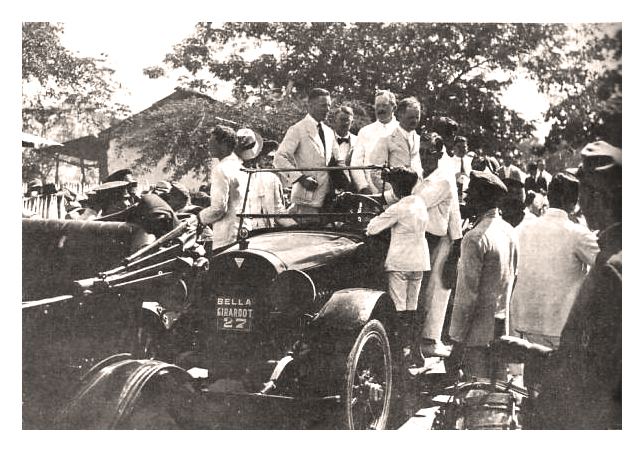 Llegada del aviador Hellmuth von Krohn de SCADTA en el Junkers F-13 a la ciudad de Girardot a orillas del río Magdalena en Colombia.